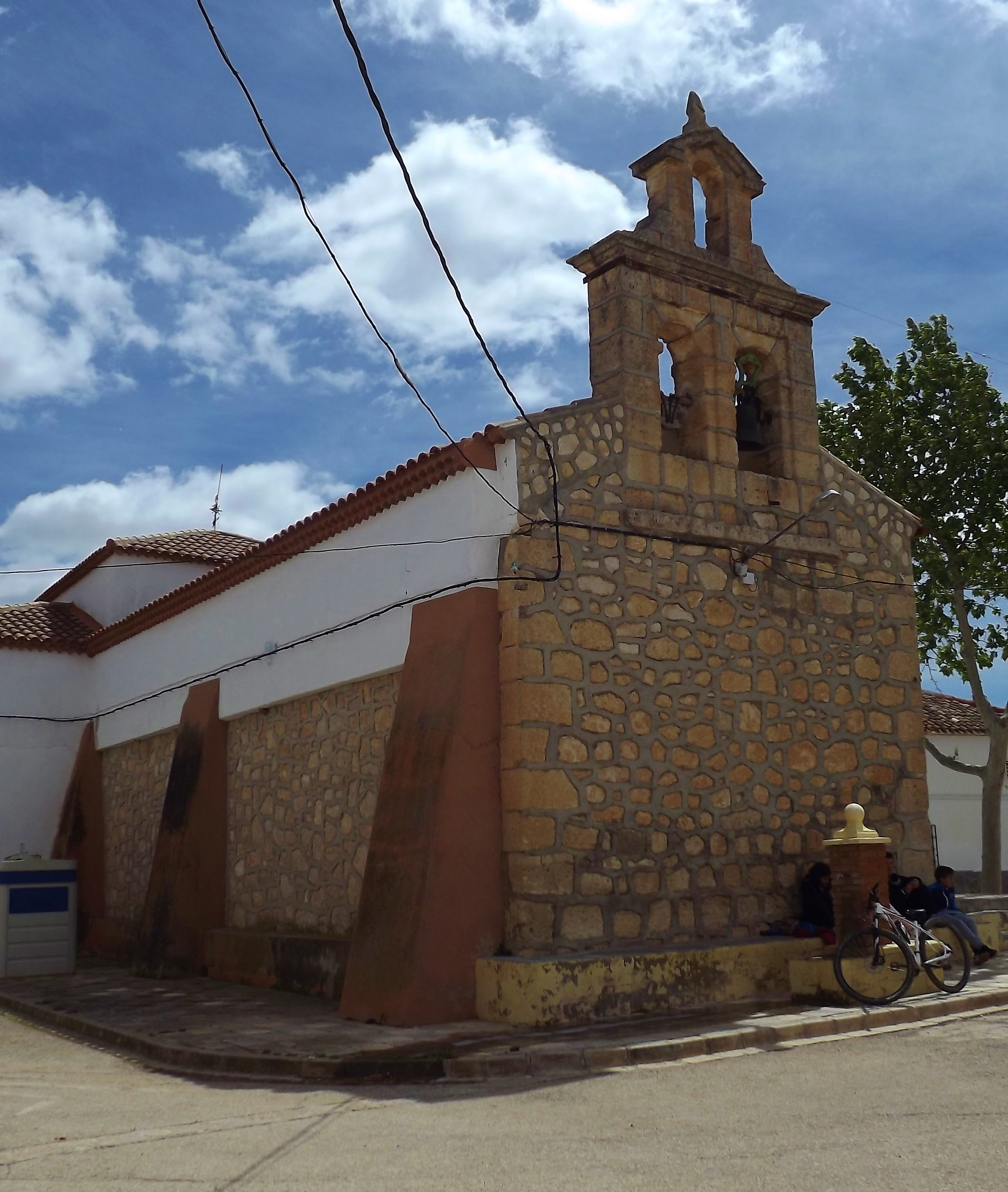 Fachada de Iglesia. Bormate